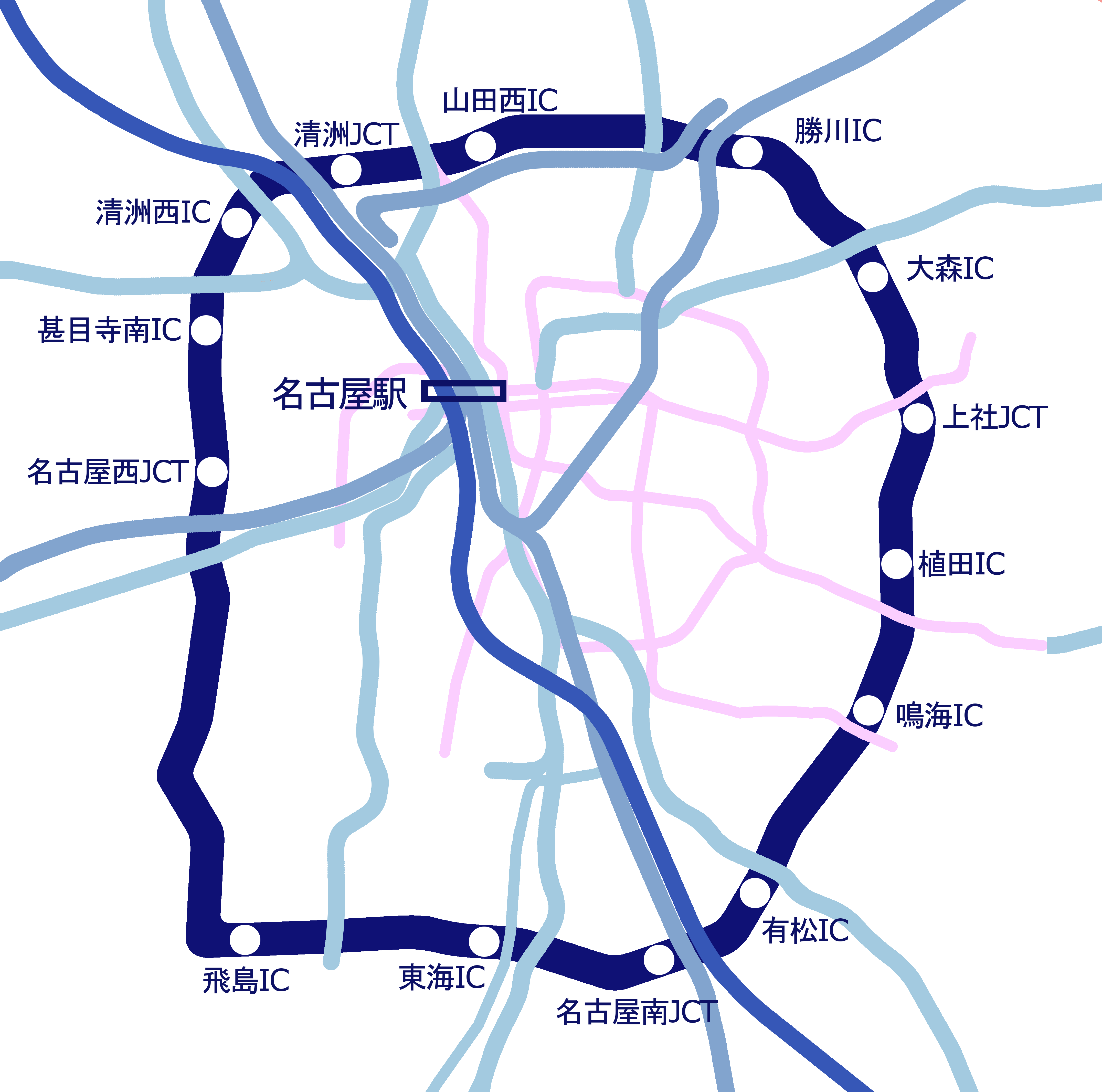 名古屋環状2号線と交差する鉄道（ゆとりーとラインは除く）